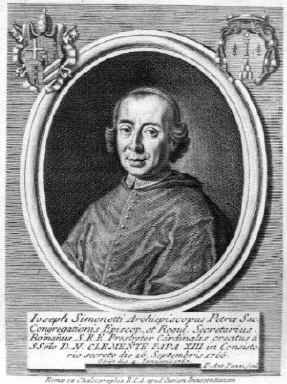 Cardinal Giuseppe Simonetti (1709-1767)